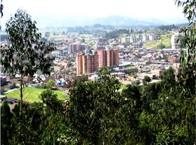 Sur de Duitama